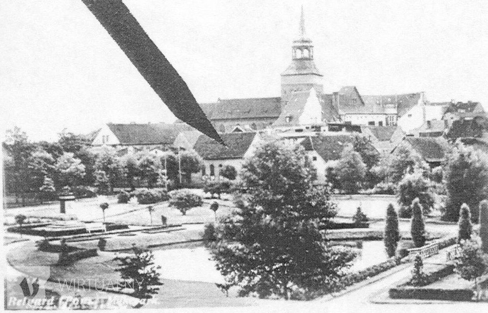 Ansichtskarte von Białogard